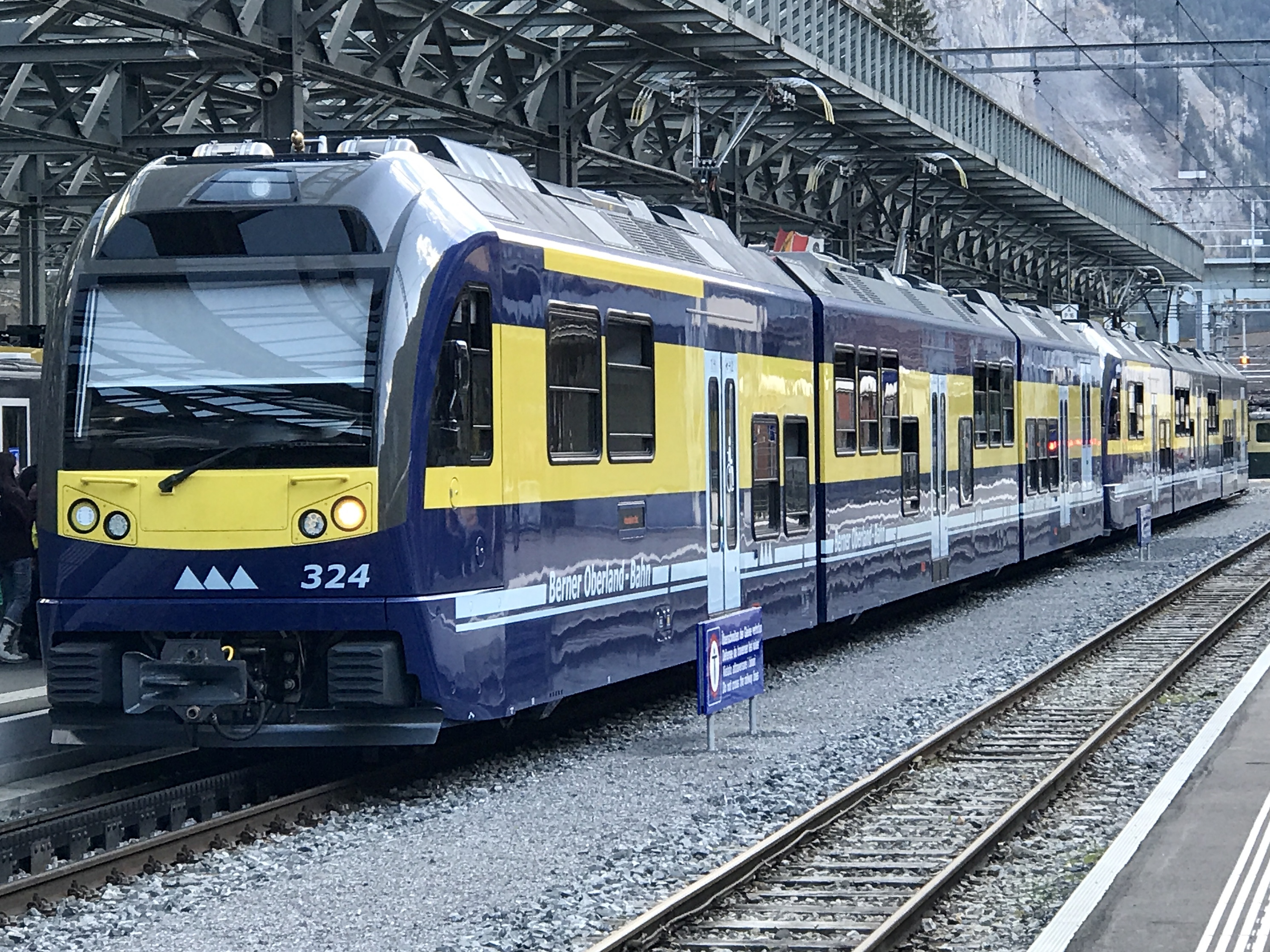 Neuer BOB Treibzug ABDeh 8/8 324 in Lauterbrunnen